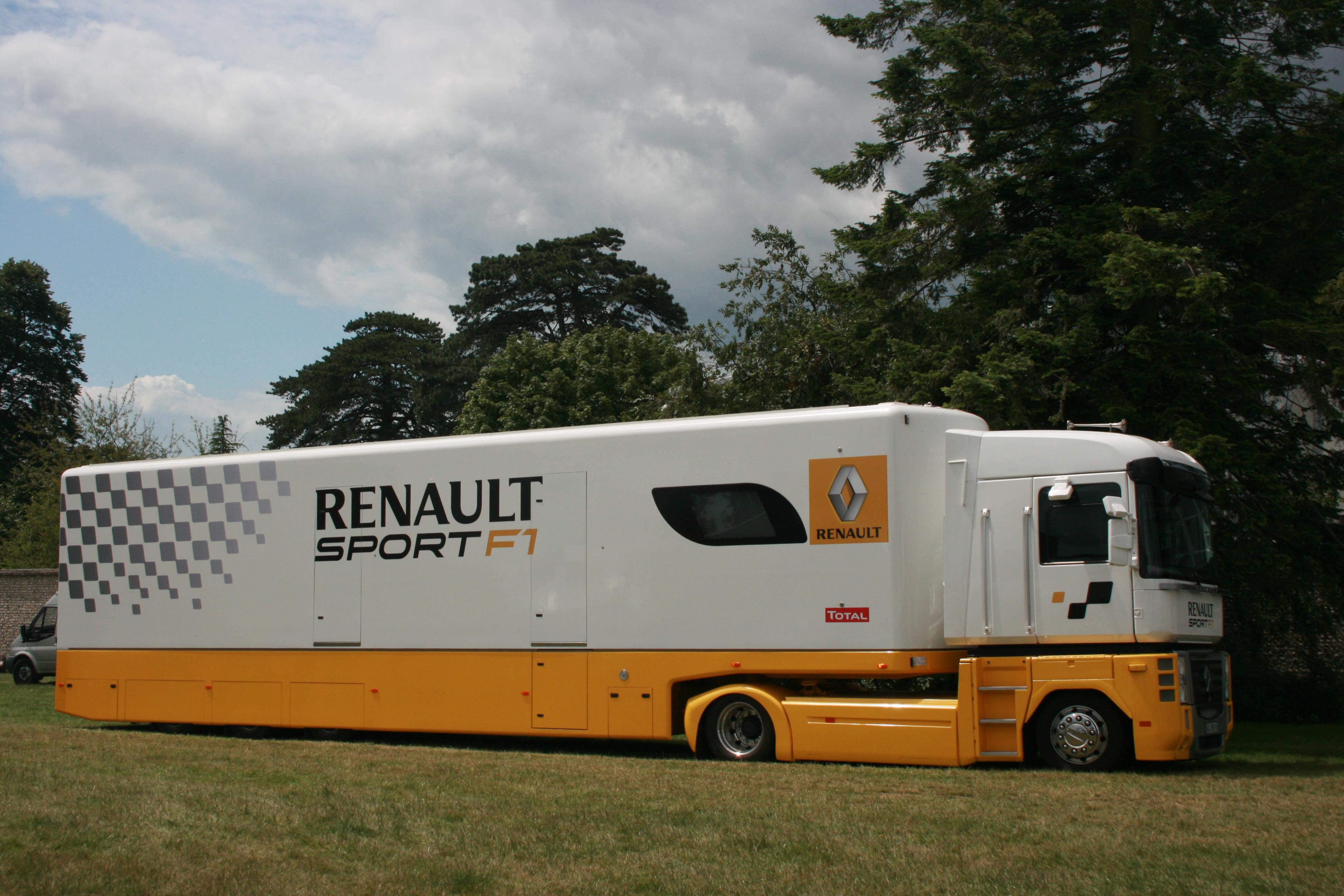 Renault Sport F1 transporter